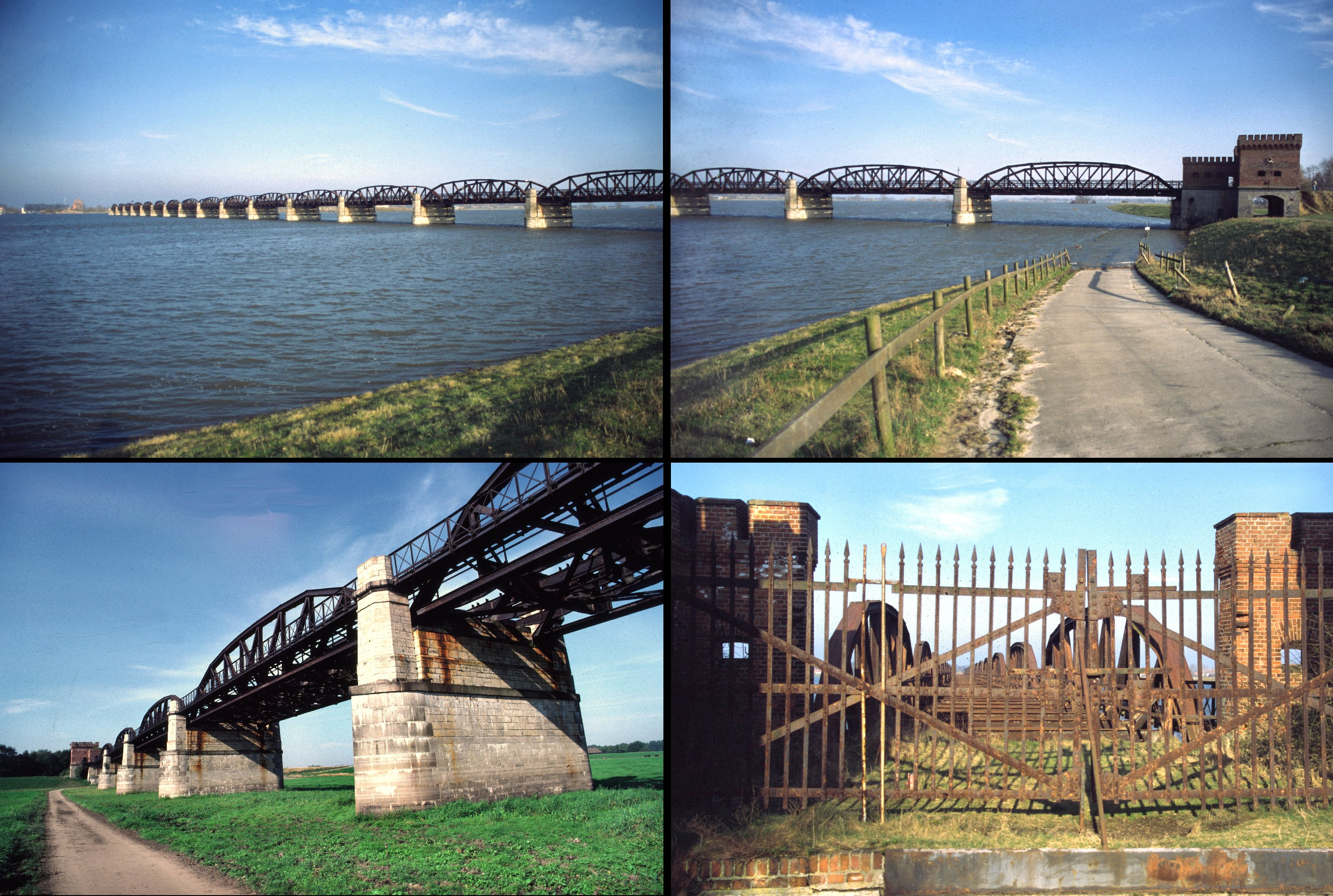 Dömitz - alte Eisenbahnbrücke